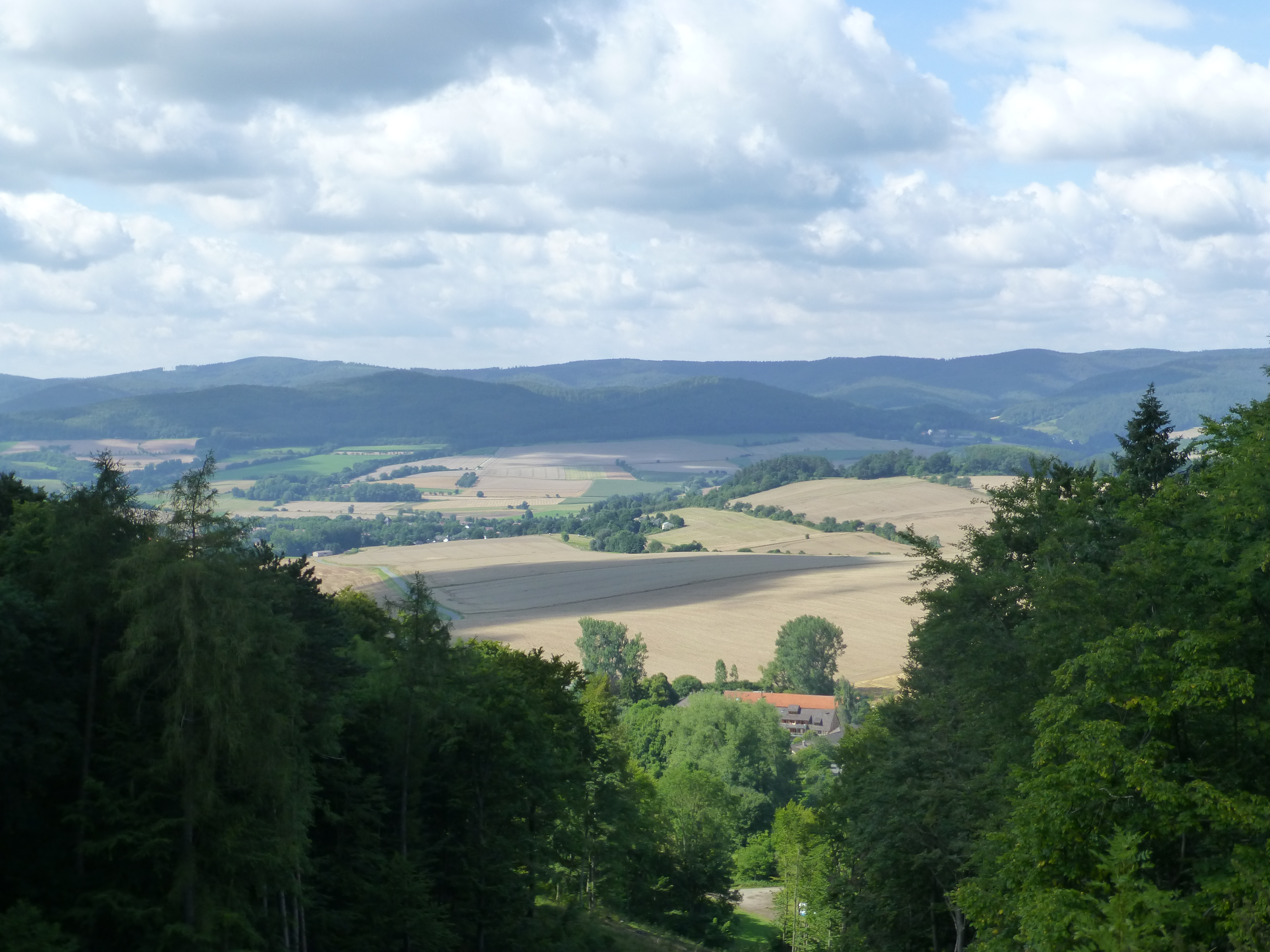 Aussicht von Schloss Berlepsch über das Werratal zum Kaufunger Wald (unterhalb des Schlosses liegt das Gut Hübenthal)